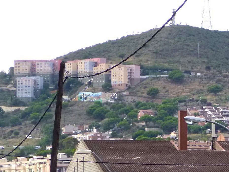 Lettre A peinte dans le quartier Can Franquesa à Santa Coloma de Gramenet